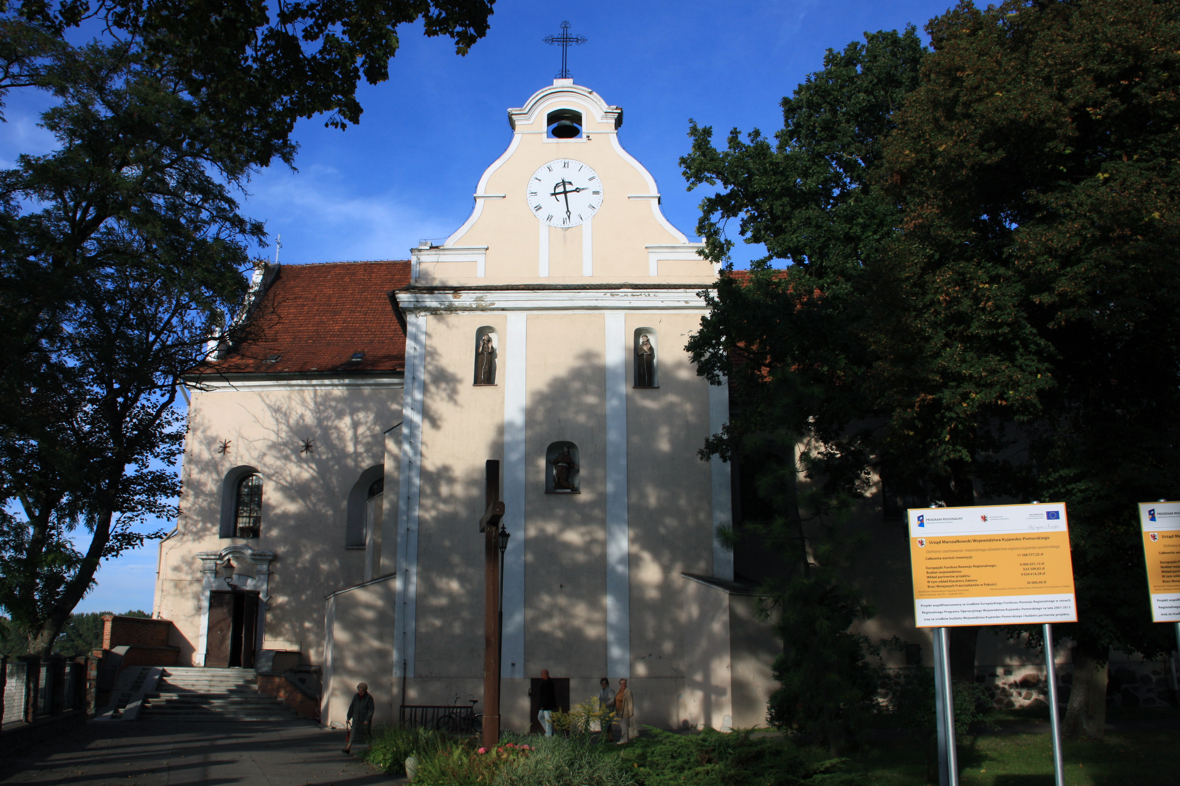 Pakość - zespół klasztorny reformatów: kościół, ob. par. pw. św. Bonawentury